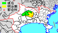 Map of Aikō, District, Kanagawa, Japan